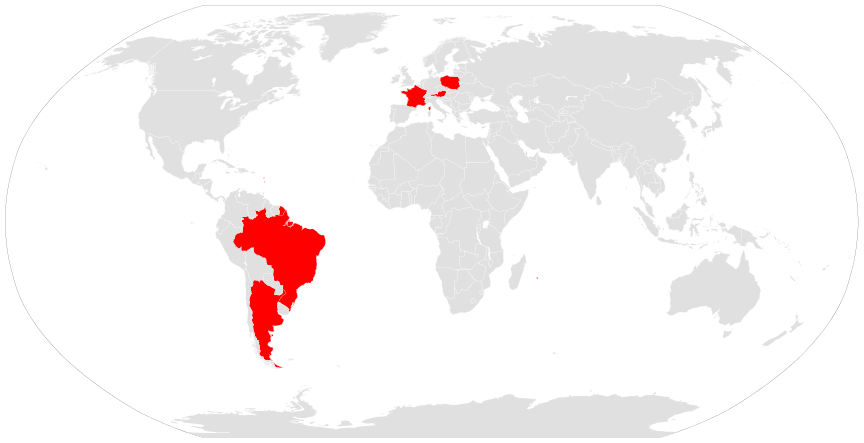 Países con ordinariatos para los fieles de rito oriental desprovistos de un ordinario de su propio rito